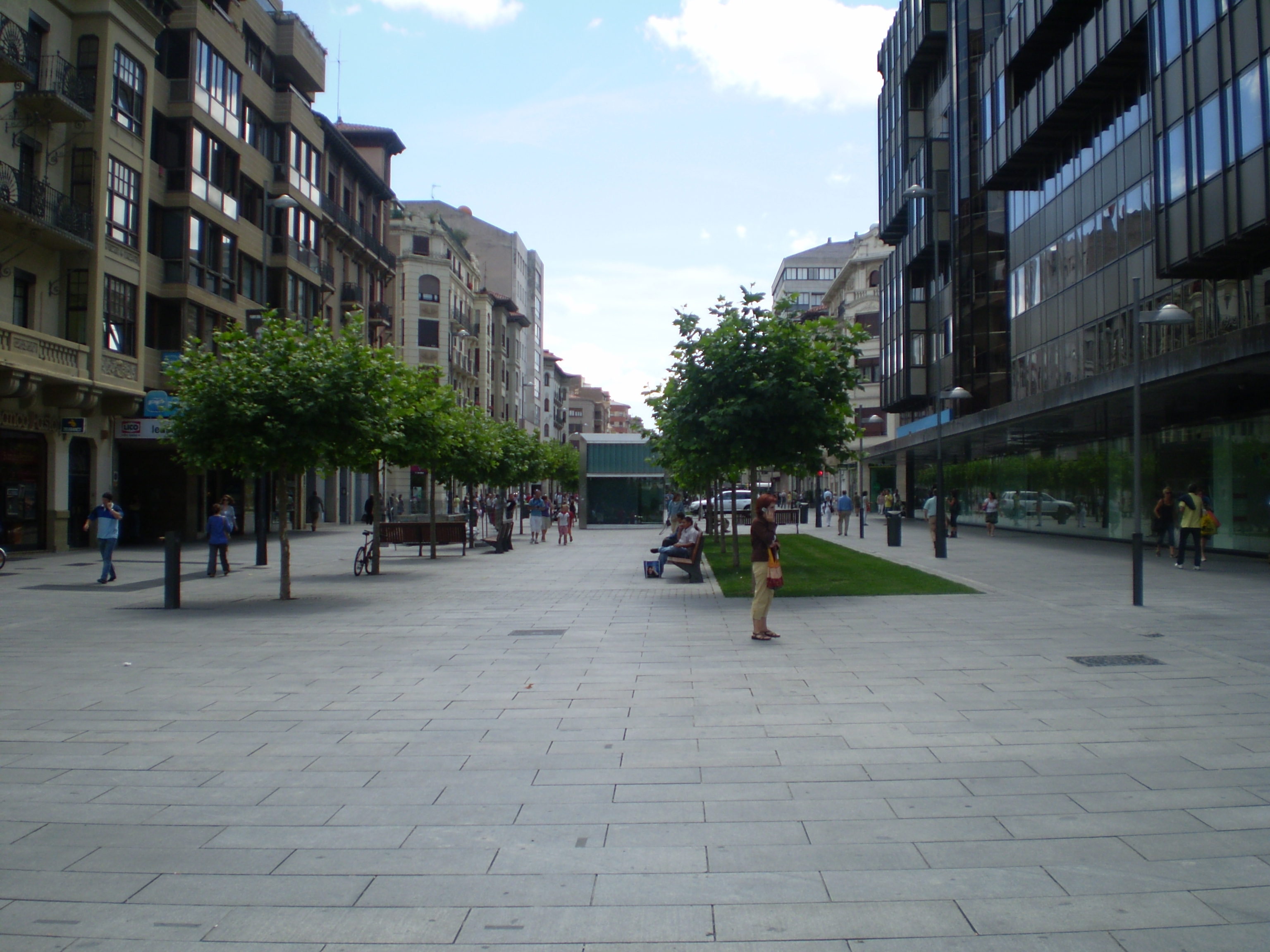 Vista de la Avenida Carlos III de Pamplona (Navarra-España)